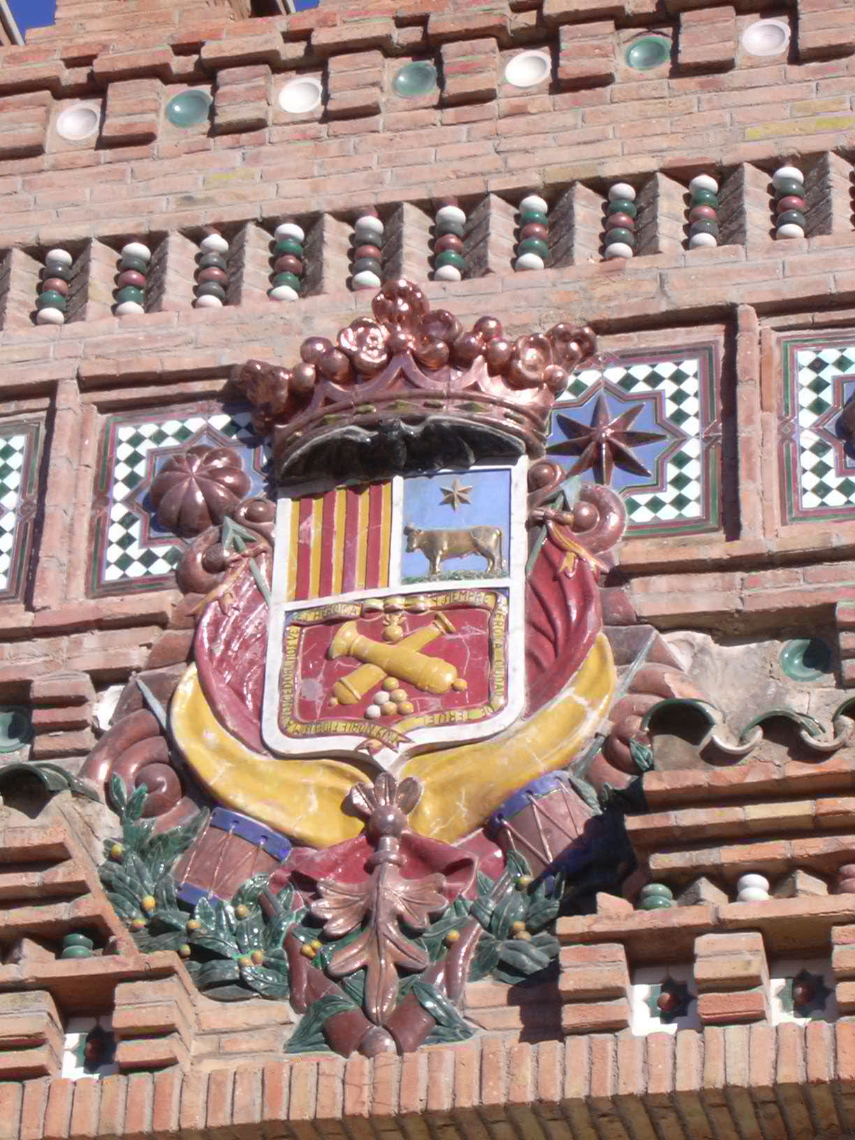 Teruel - Antiguo escudo de Teruel en escalinata neomudéjar